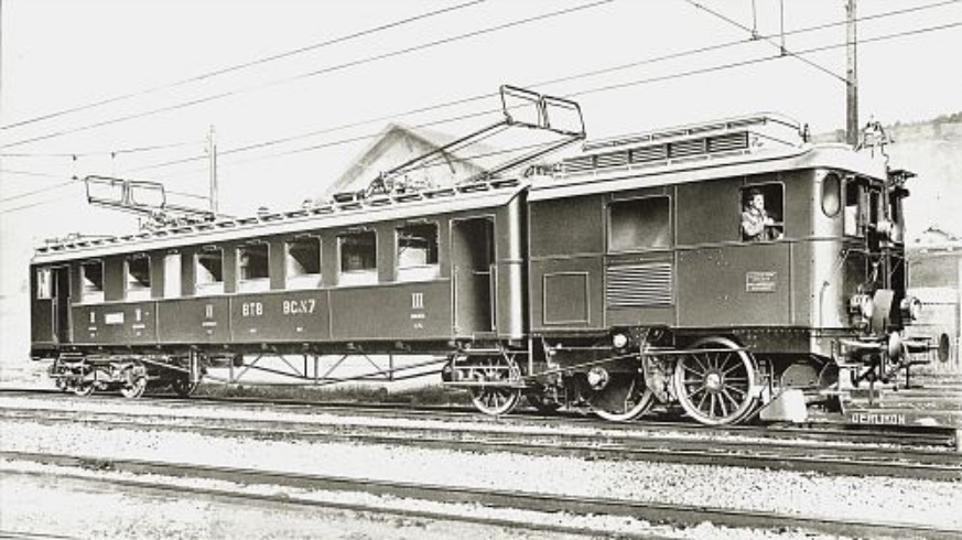 BCe 2-5 der Burgdorf-Thun-Bahn (BTB) Nr. 7 Die 1921 von der Maschinenfabrik Oerlikon (MFO) und der Schweizerischen Industriegesellschaft (SIG) in Neuhausen am Rheinfall gelieferten Triebwagen BCe 2/5 Nr. 7 und 8 waren eine Kombination von zweiachsiger Lok mit aufgestütztem, dreiachsigem Anhänger, wie sie 1925 ähnlich von den gleichen Firmen auch an die BLS-Gruppe geliefert wurden, allerdings hier für Einphasen-Wechselstrom-Speisung (CFe 2/6 „„Halbesel“). Die Leistung der 56 t schweren BTB-Triebwagen betrug 324 kW, die Höchstgeschwindigkeit 60 km/h. Als die Burgdorf-Thun-Bahn 1933 auf Einphasen-Wechselstrom 15 kV 16 2/3 Hz umgestellt wurde, baute man aus den Wagenteilen der beiden BCe 2/5 Steuerwagen BCt.